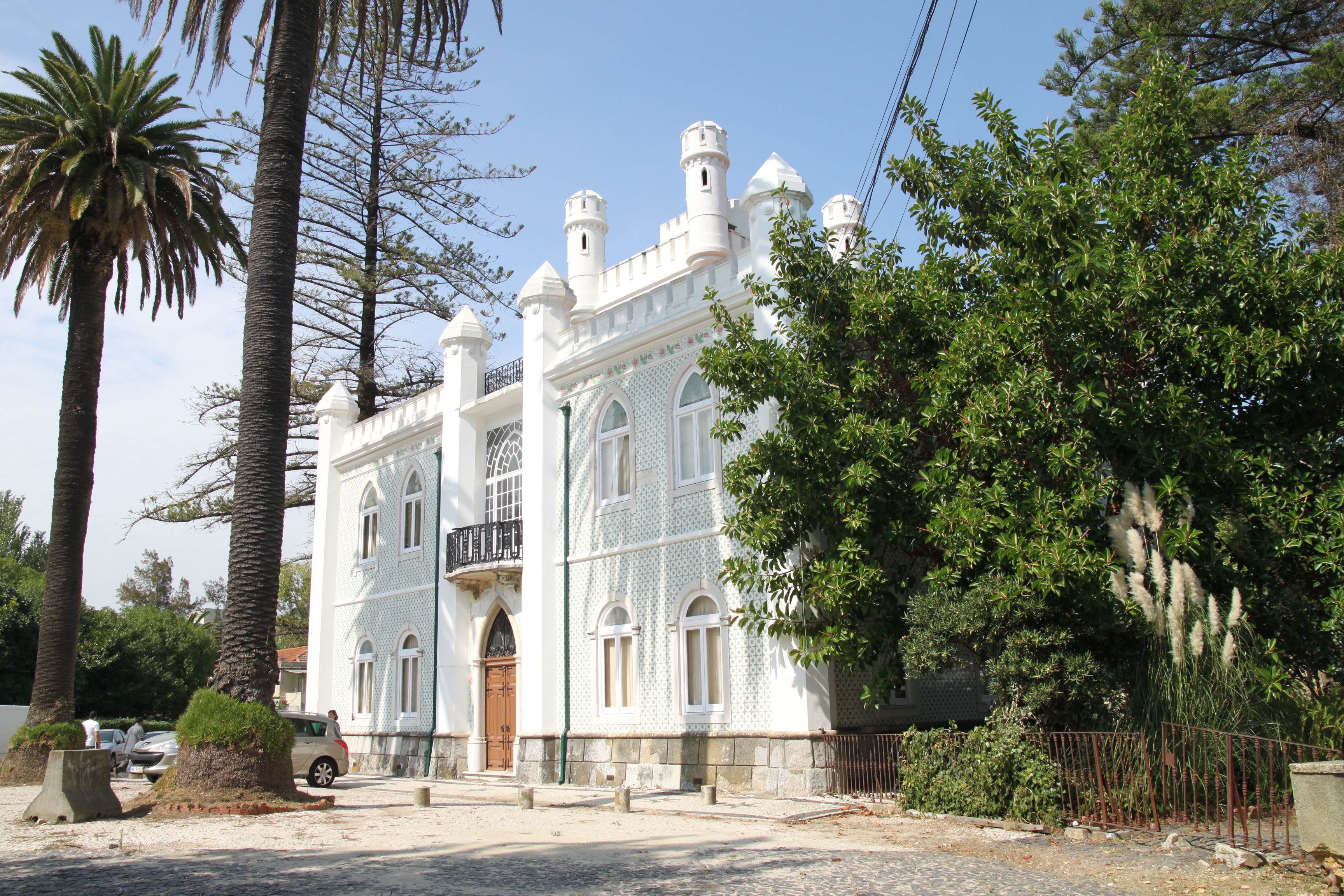 Quinta da Torrinha / Castelinho This file was uploaded for Wiki Loves Monuments in Portugal with the unique identifier 97030919.